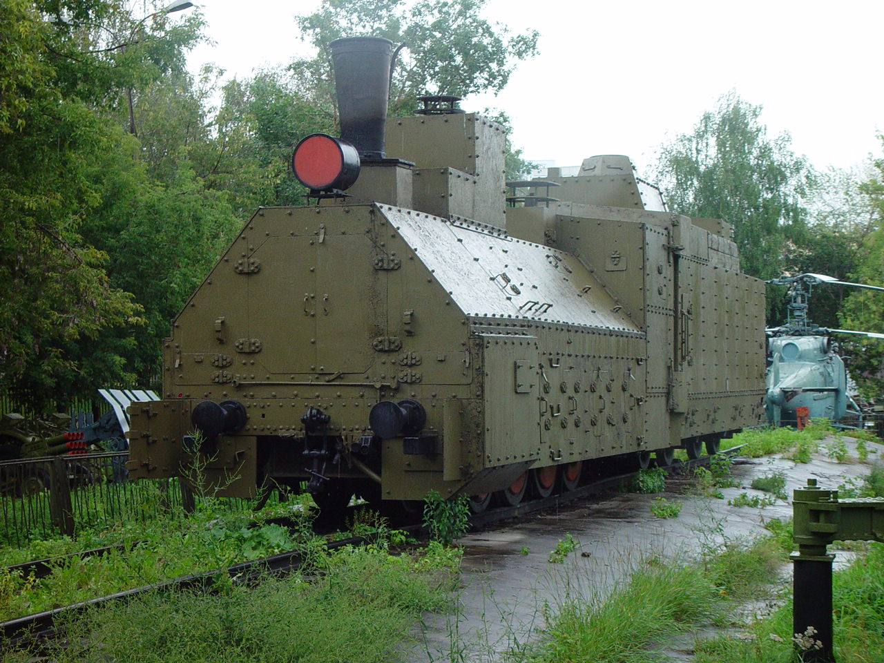 Бронепаровоз OВ № 5067. За ним виден один из последних эксплуатировавшихся Ка-25Ц